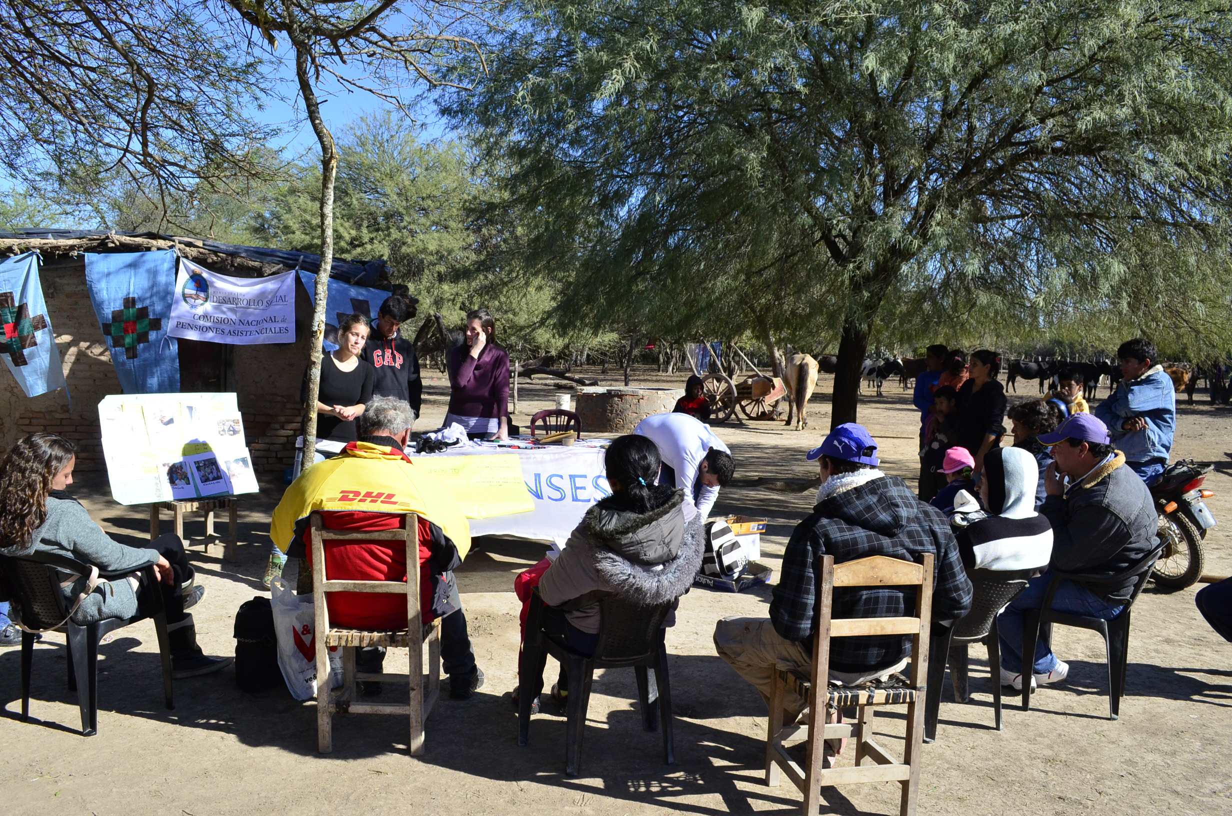 Las acciones que lleva adelante ANSES orientadas a los pueblos originarios aseguran la presencia de la seguridad social, con criterios de pluralidad, inclusión y participación de las comunidades donde el organismo acciona. Actualmente, el organismo previsional desarrolla diferentes programas que abordan la cuestión indígena de una manera integral: capacitación presencial, campaña informativa en lenguas originarias y entrega de netbooks en escuelas de Educación Intercultural Bilingüe. Desde 2009, implementa el programa Bienestar para nuestra gente de capacitación en Seguridad Social para los pueblos indígenas. El programa tiene como propósito garantizar el acceso de los pueblos indígenas a las prestaciones de la Seguridad Social, desde el respeto y valorización de su identidad cultural. La iniciativa contempla el mejoramiento de los canales institucionales para la tramitación de las prestaciones de ANSES y formación y capacitación sobre los derechos. Para complementar las jornadas de formación y ampliar el impacto, durante 2011 trabajó en una campaña informativa en diversas lenguas indígenas para realizar afiches y micros radiales sobre la Asignación Universal y por Embarazo, la posibilidad de obtener una jubilación y los derechos sociales que otorga ANSES. La campaña informativa en lenguas indígenas se realizó de manera participativa, por eso ANSES realizó jornadas junto a qom y wichis de Ing. Juarez en Formosa y con mbya guaraní de Aristóbulo del Valle, Misiones. Todas las comunidades recibieron con entusiasmo la propuesta y emprendieron el trabajo de realizar las traducciones en conjunto. En cada una de los encuentros se debatía acerca del significado para la comunidad de las prestaciones que brinda ANSES y los maestros bilingües fueron los encargados de las traducciones tanto para el guión del spot radial como para el texto de la pieza gráfica.